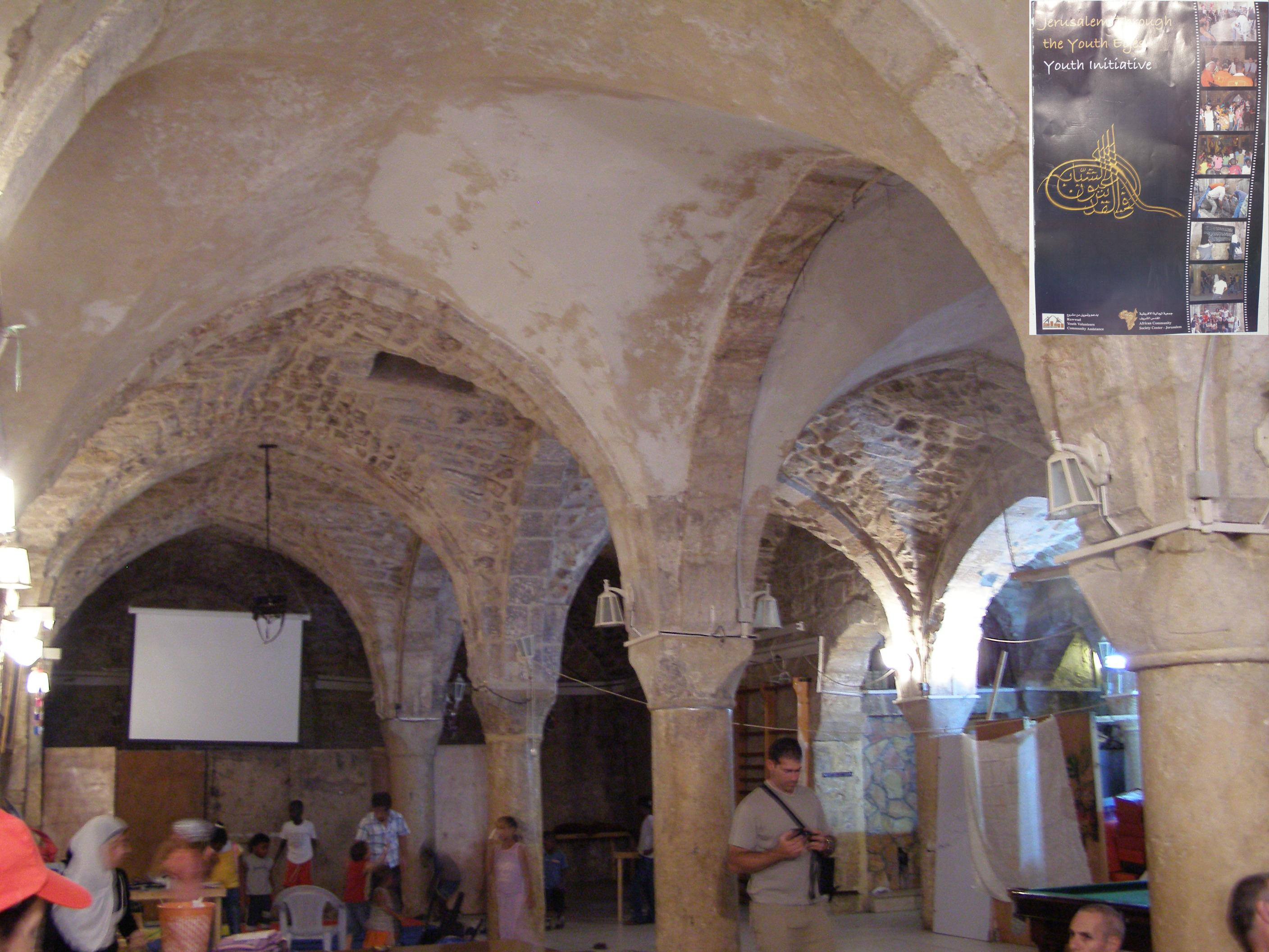 מועדון נוער ברובע המוסלמי